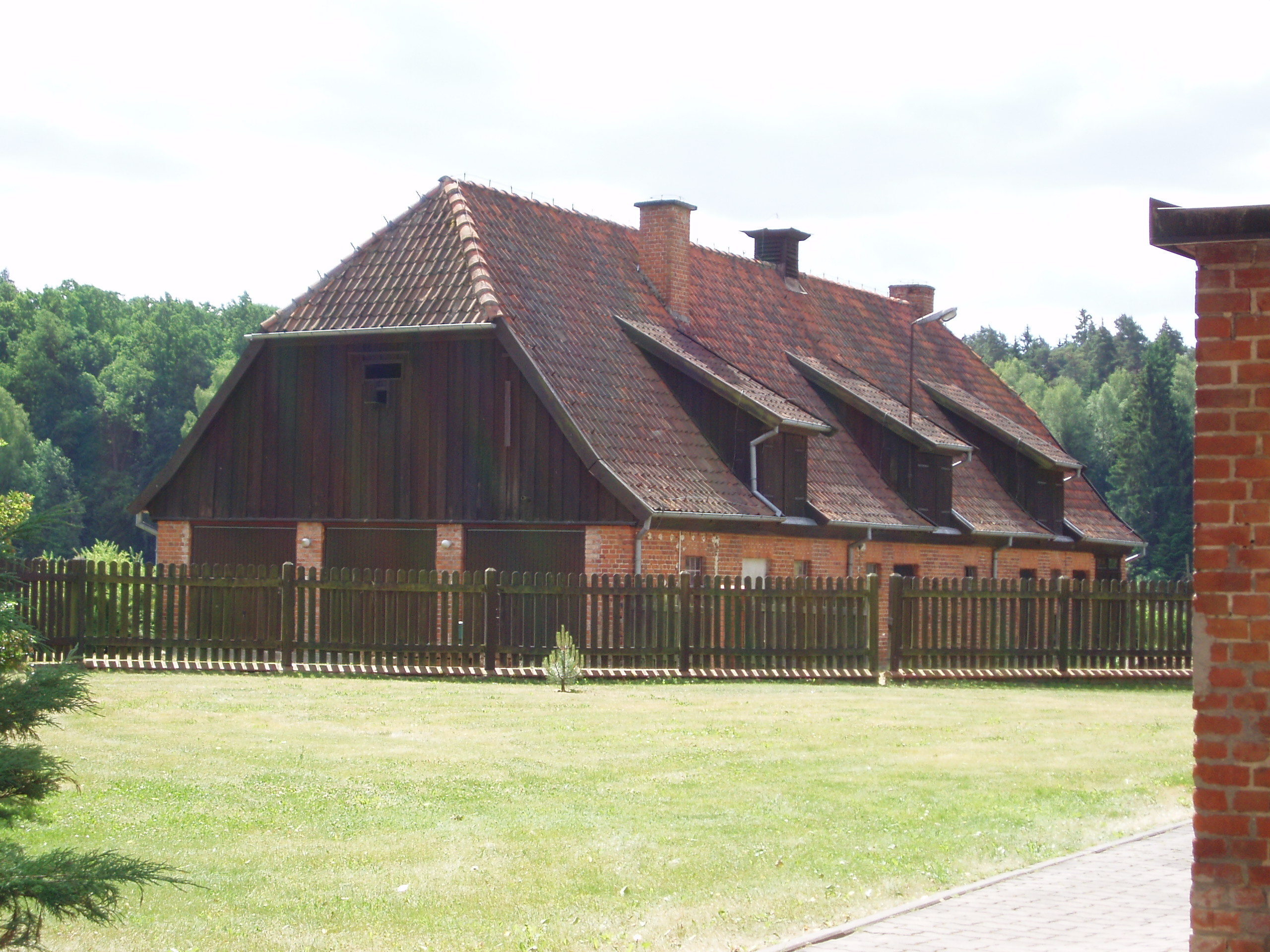 zabudowania nadleśnictwa Wichrowo, gmina Dobre Miasto